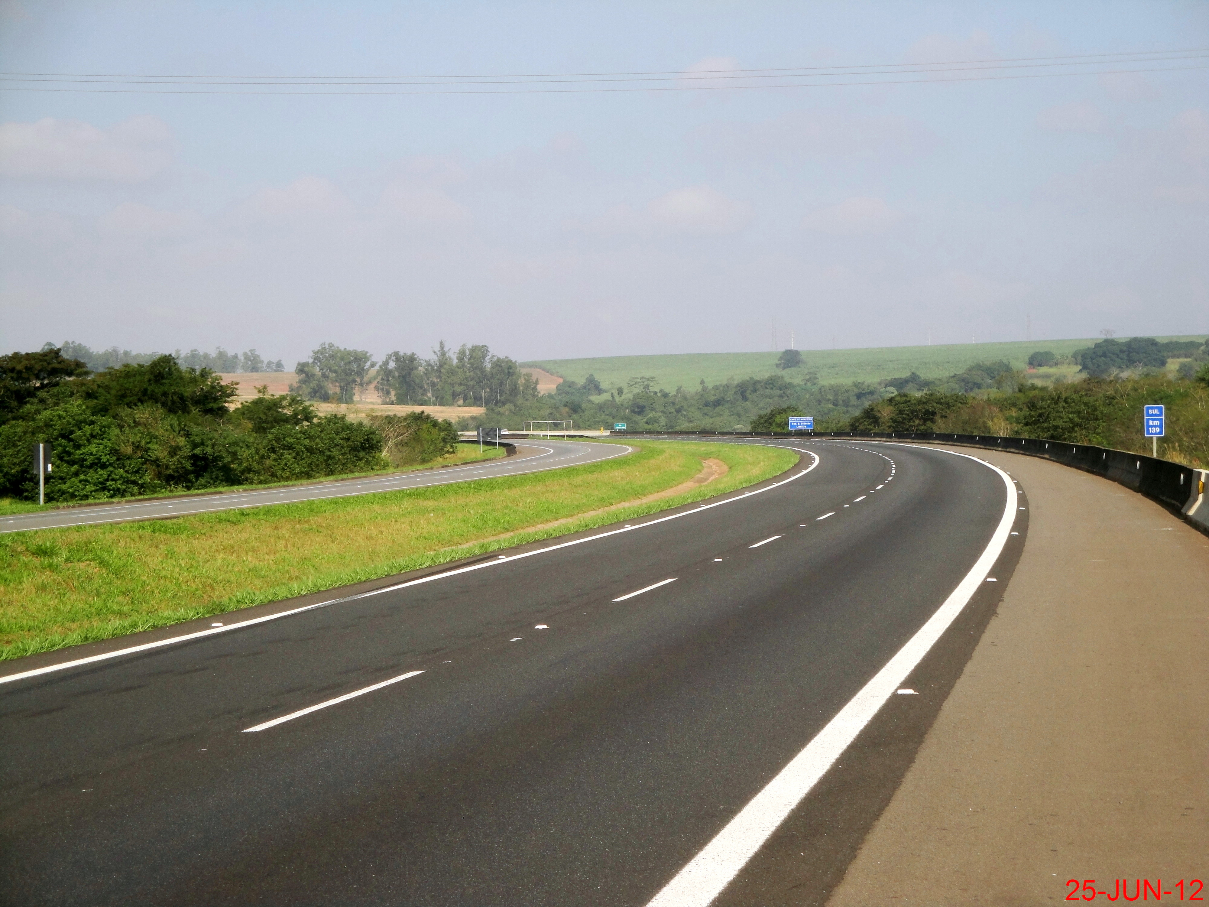 Descida do Rio Piracicaba na Rodovia dos Bandeirantes SP-348 Km-139